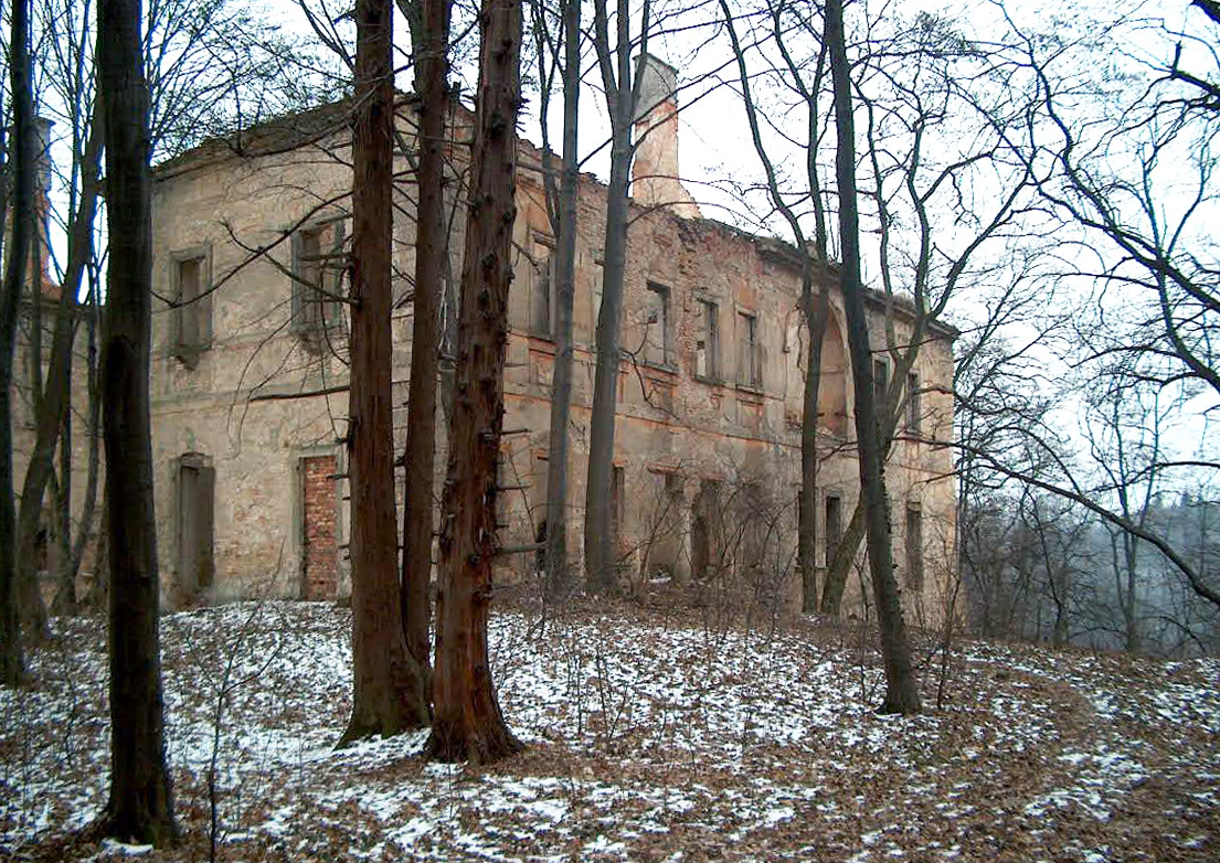 Polska. Powiat Lwówek Śląski, wieś Skała, ruiny pałacu.